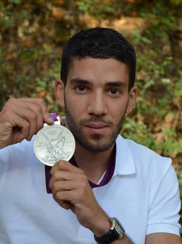 Mahiedine Mekhissi, double vice-champion Olympique du 3000m steeple